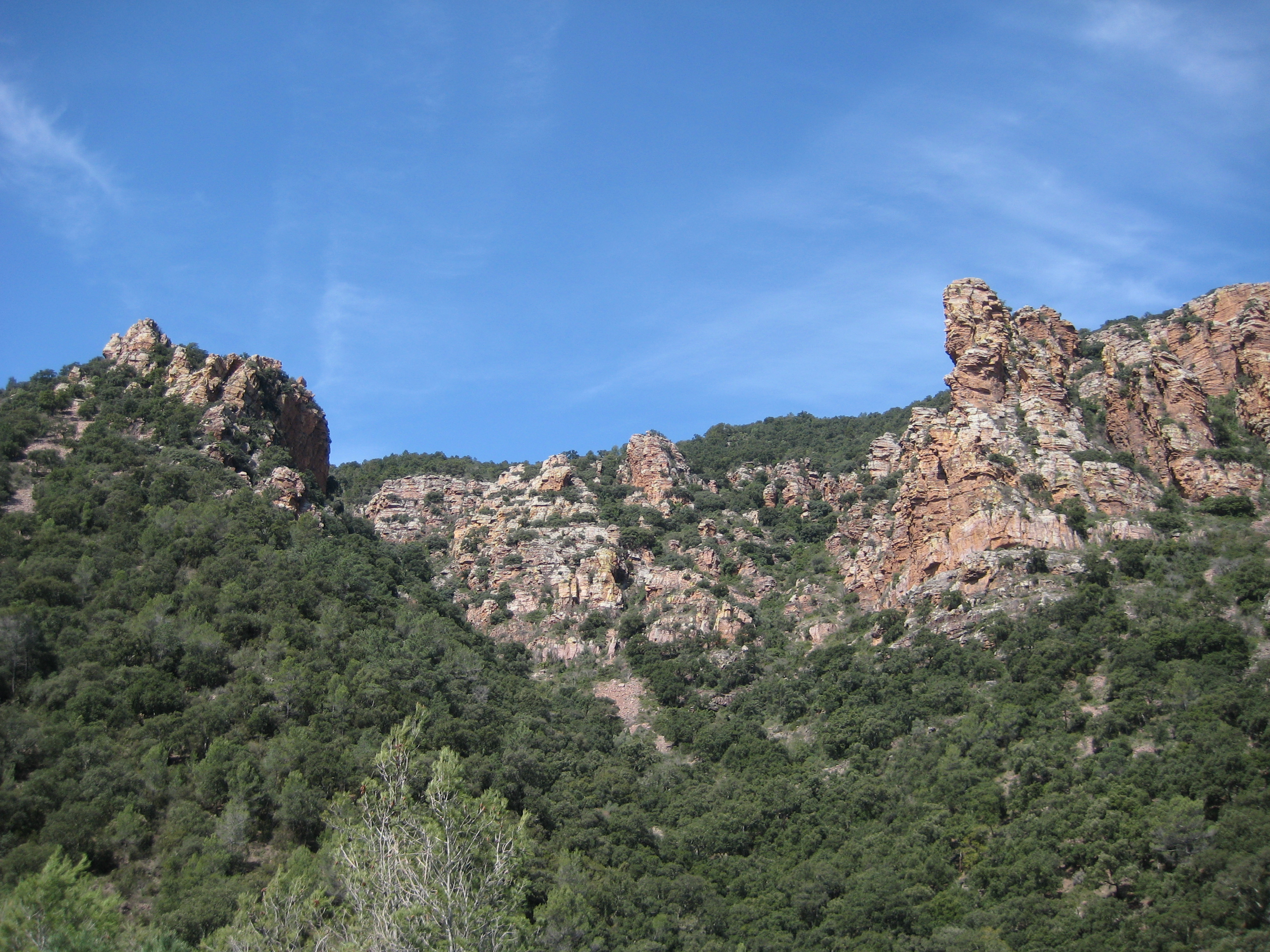 Orgues de Benitandús, L'Alcúdia de Veo (Plana Baixa)